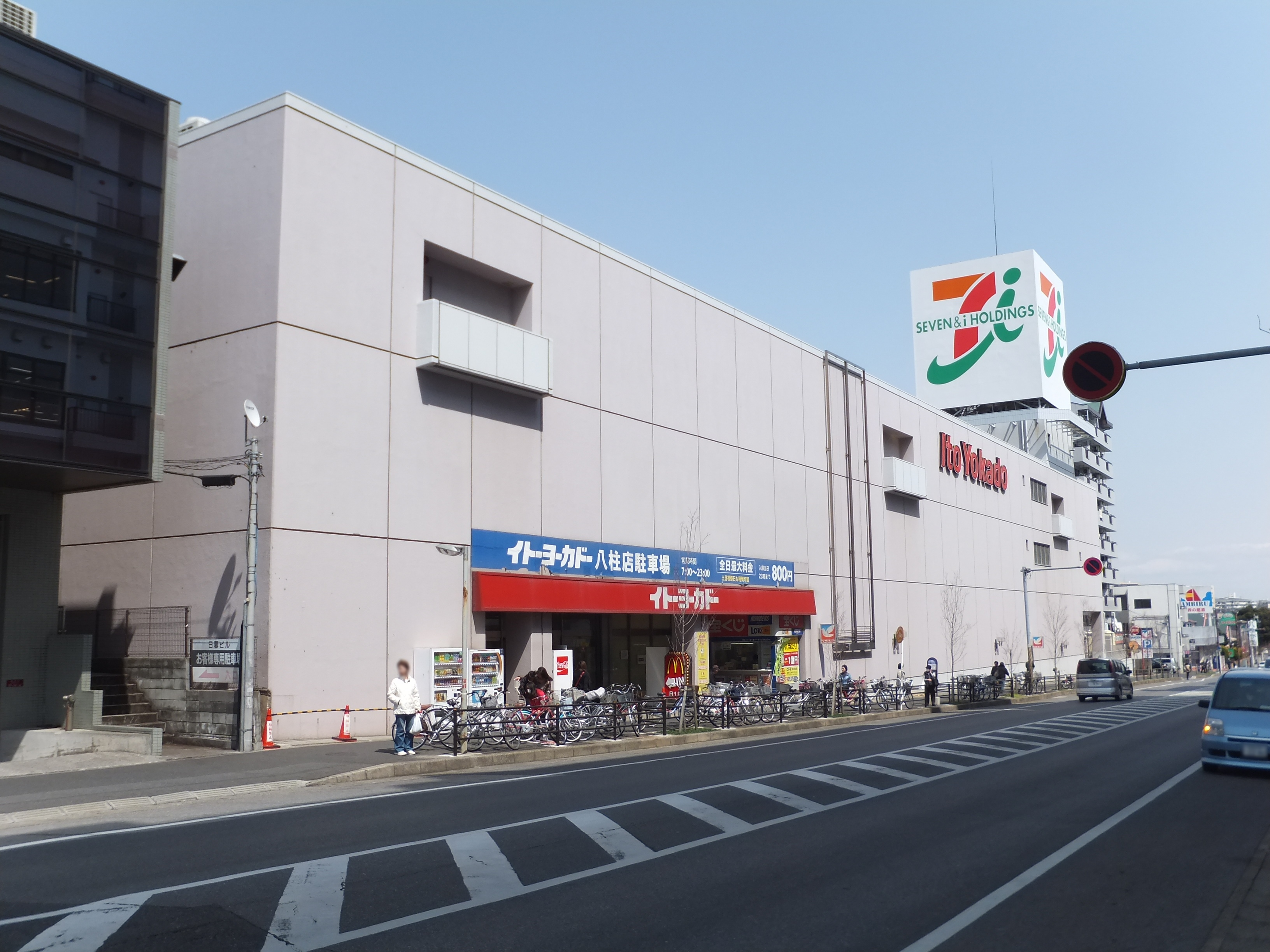 イトーヨーカ堂八柱店（千葉県松戸市）